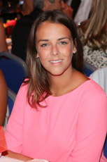 на летнем гала ужине